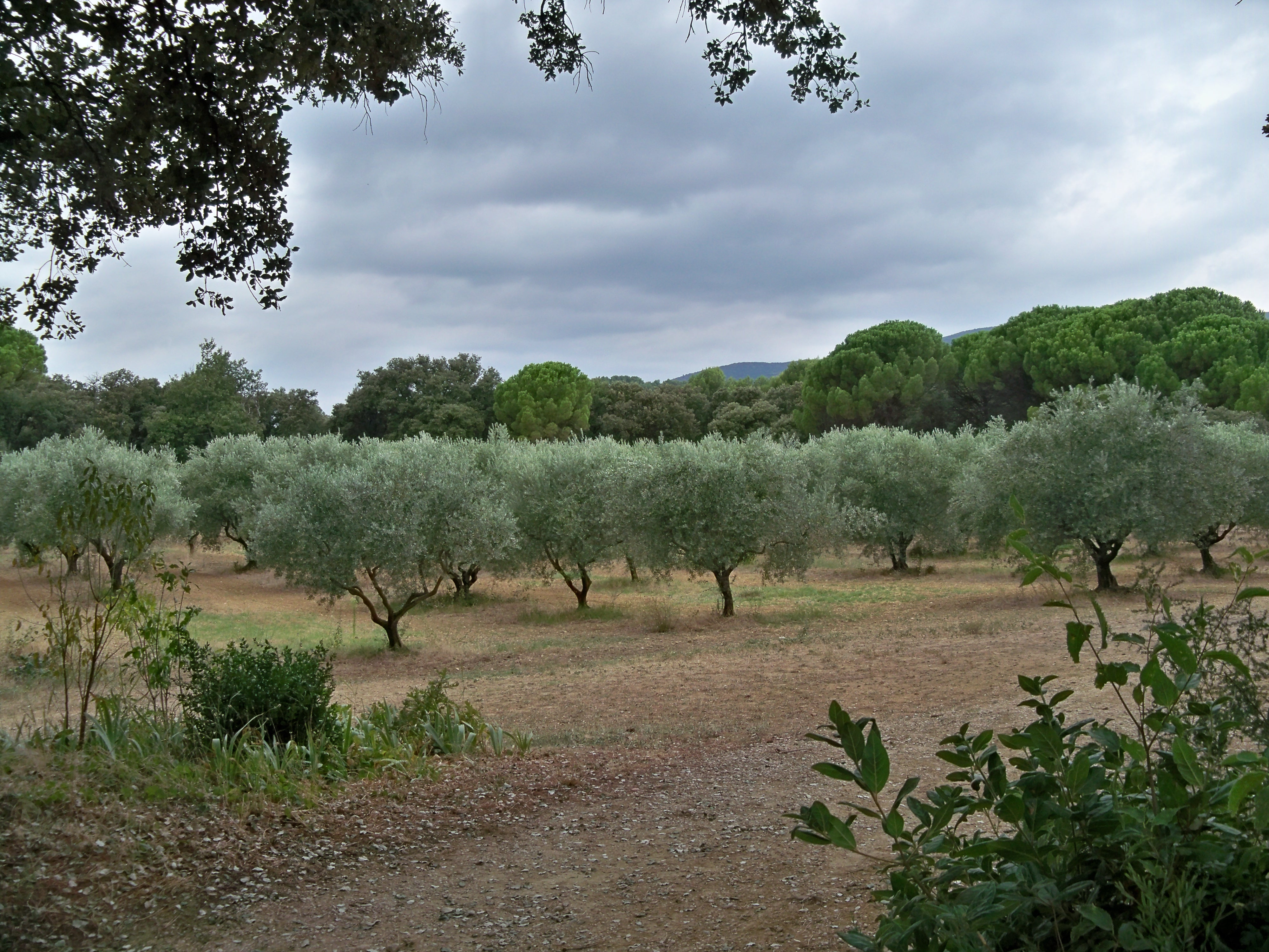 Oliveraie derrière le Chateau de Lourmarin (84)